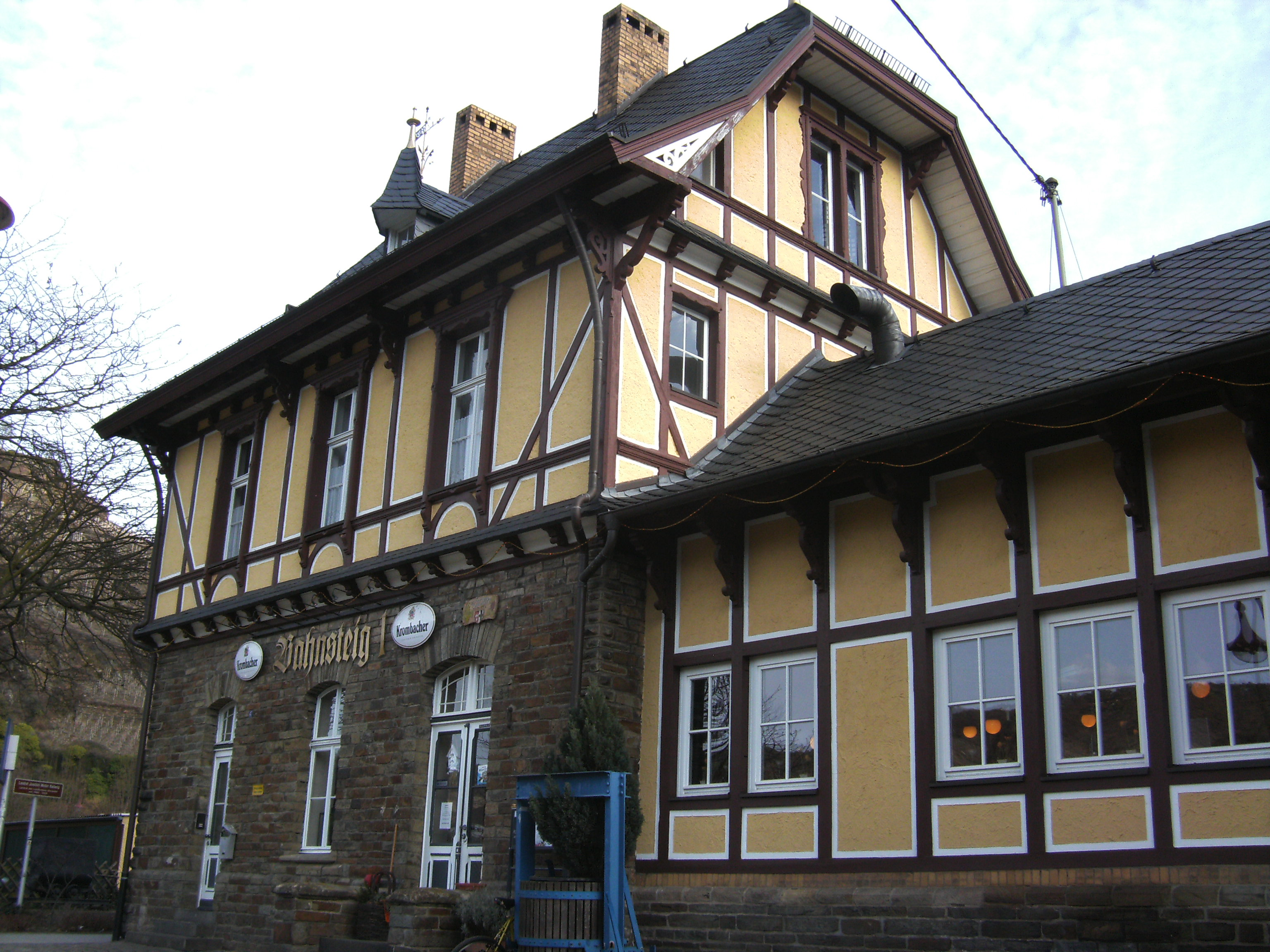 Altes Bahnhofsgebäude an der Ahrtalbahn in Mayschoß